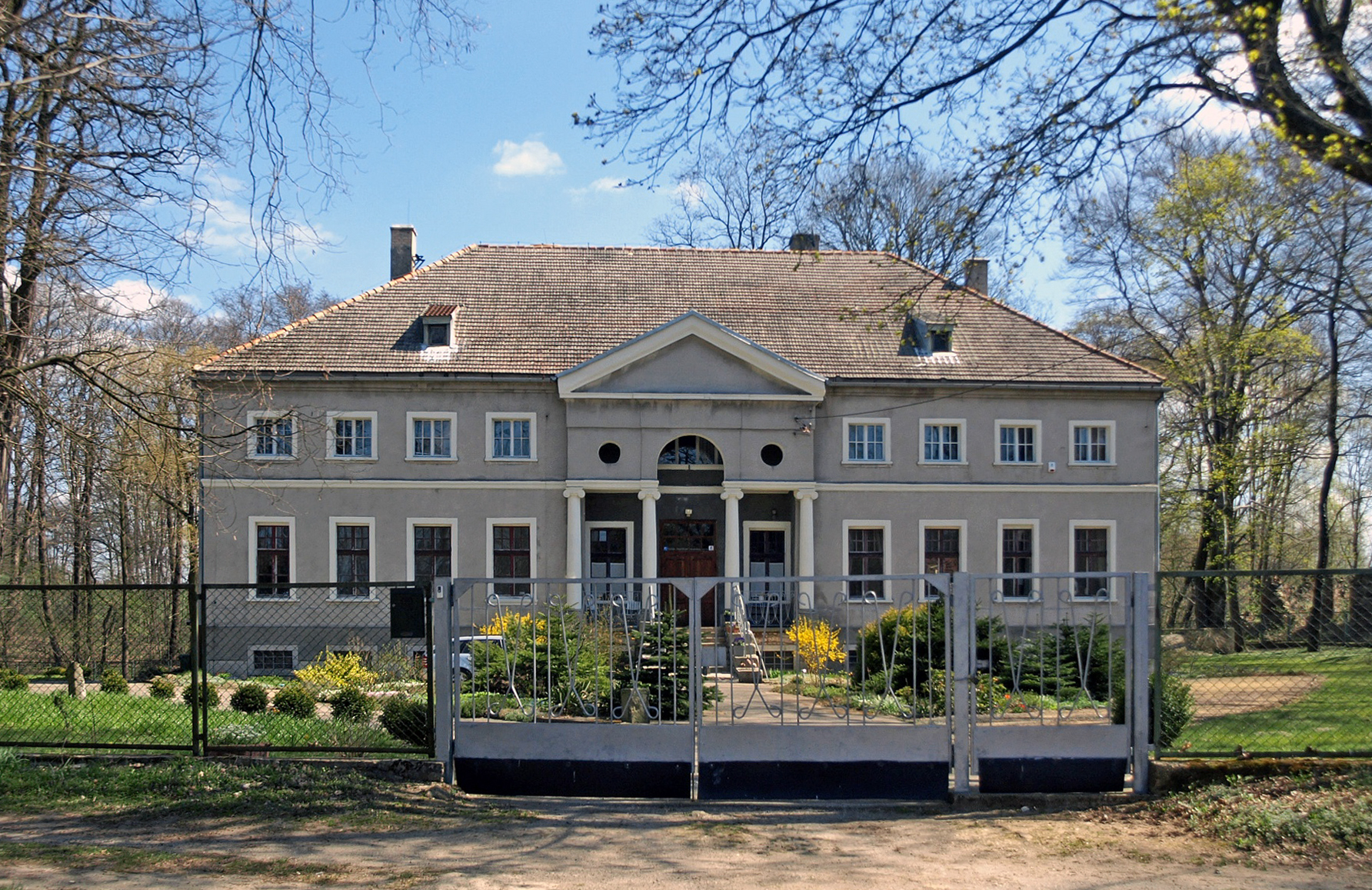 Schloss Kieslingswalde (Sławnikowice)